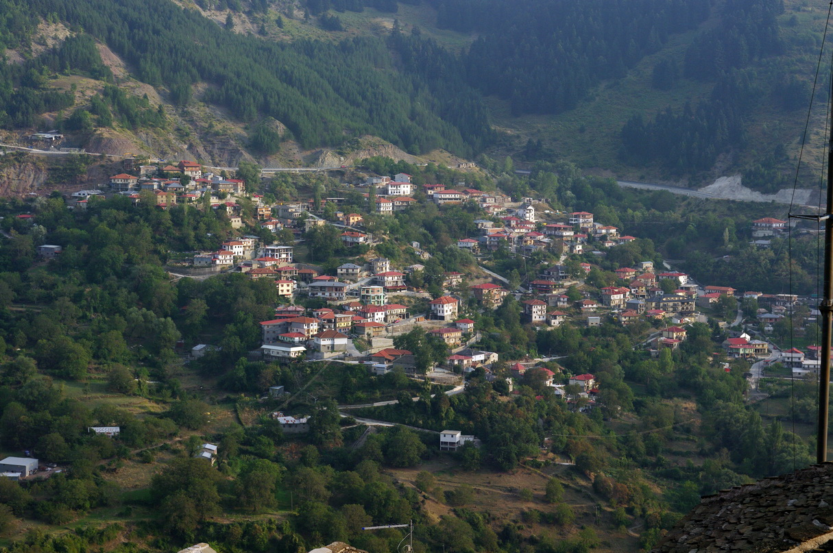 Metsovo Ortsteil Anilio